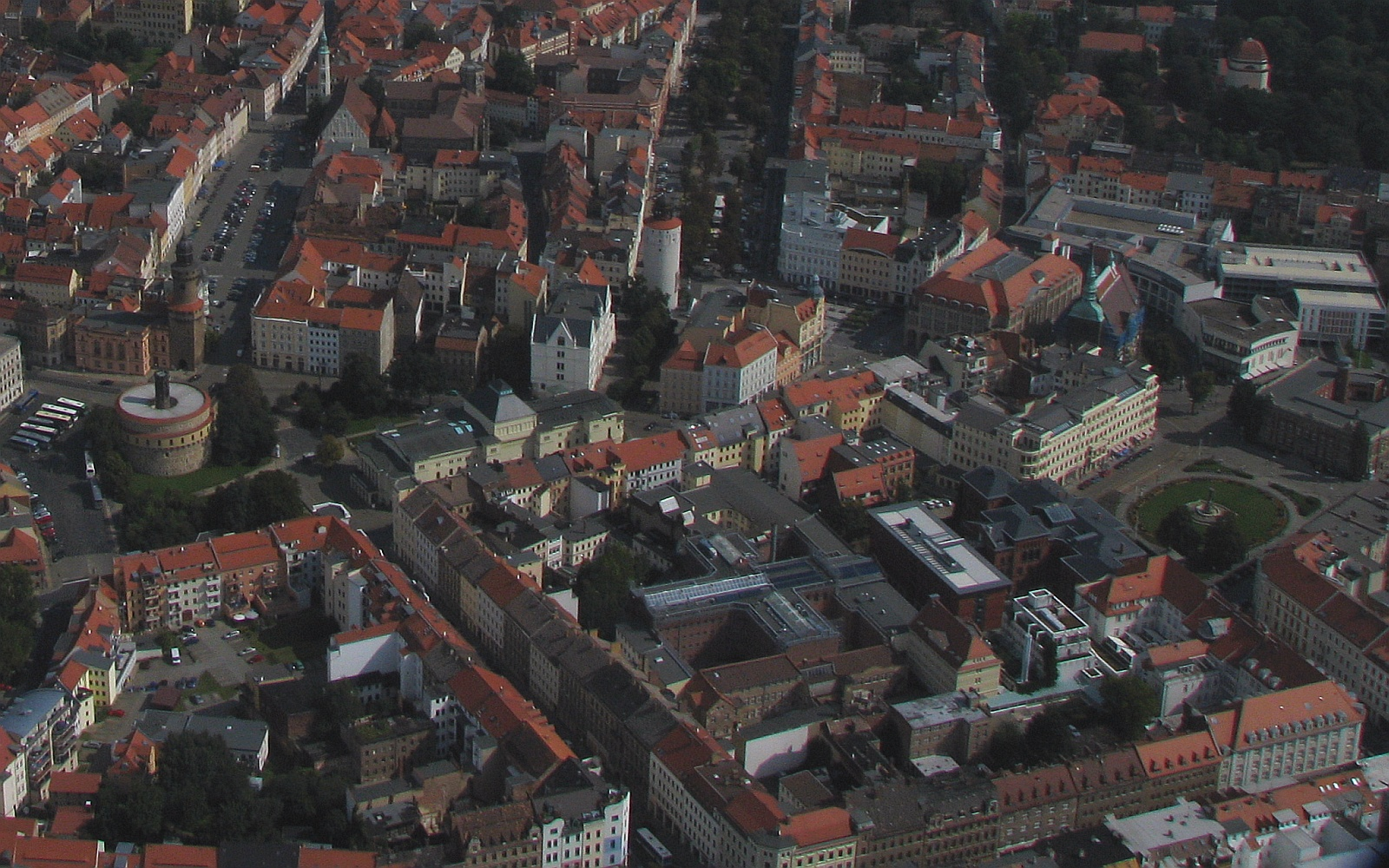 Görlitz Luftbild Innenstadt Kaisertrutz Marienplatz Postplatz Sachsen Saxony Germany Foto 2008 Wolfgang Pehlemann Wiesbaden PICT4442